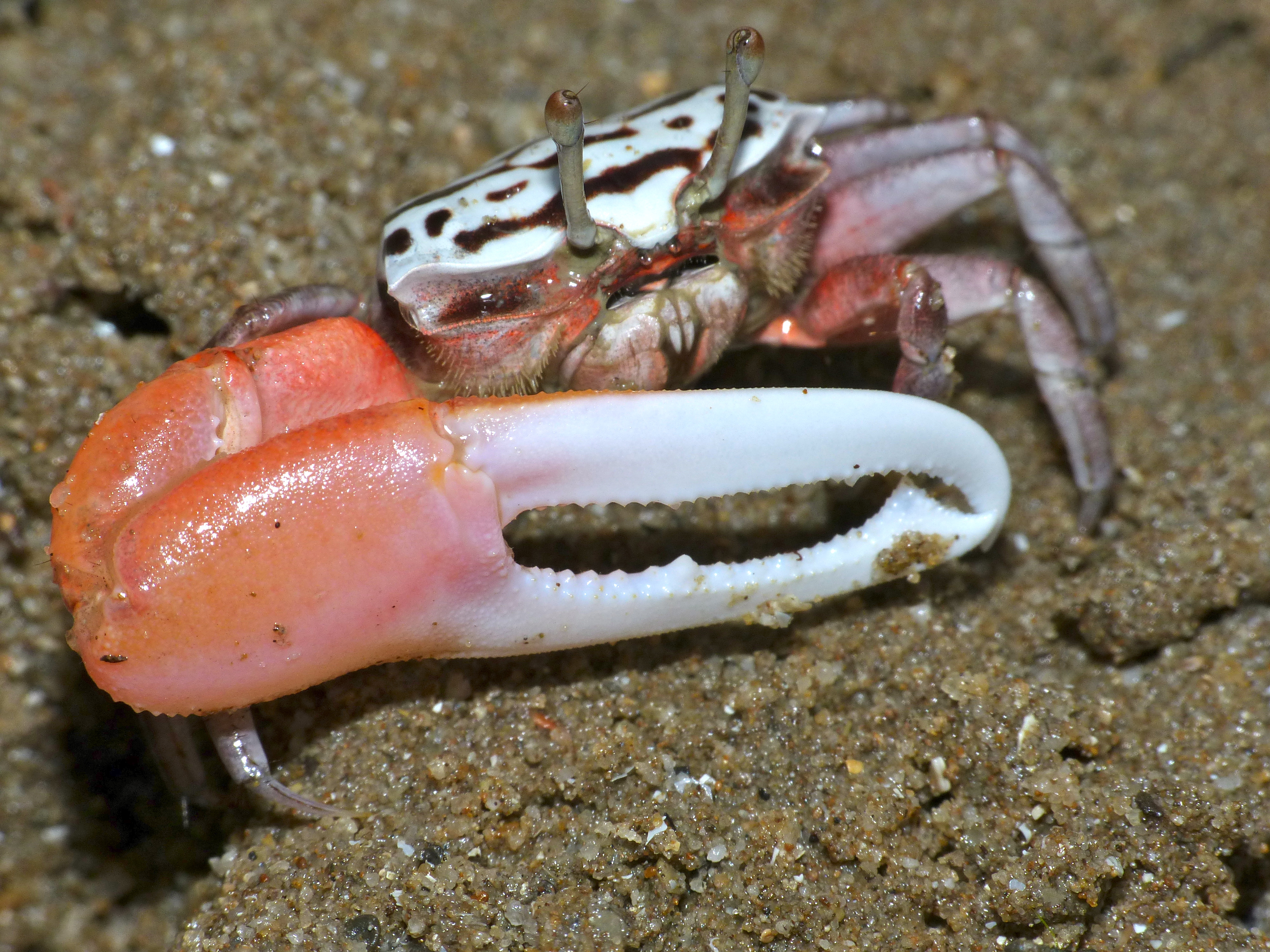 Bako NP, Sarawak, MALAYSIA